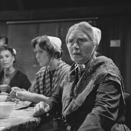 Setfoto van het Nederlandse televisiespel Op Hoop Van Zegen